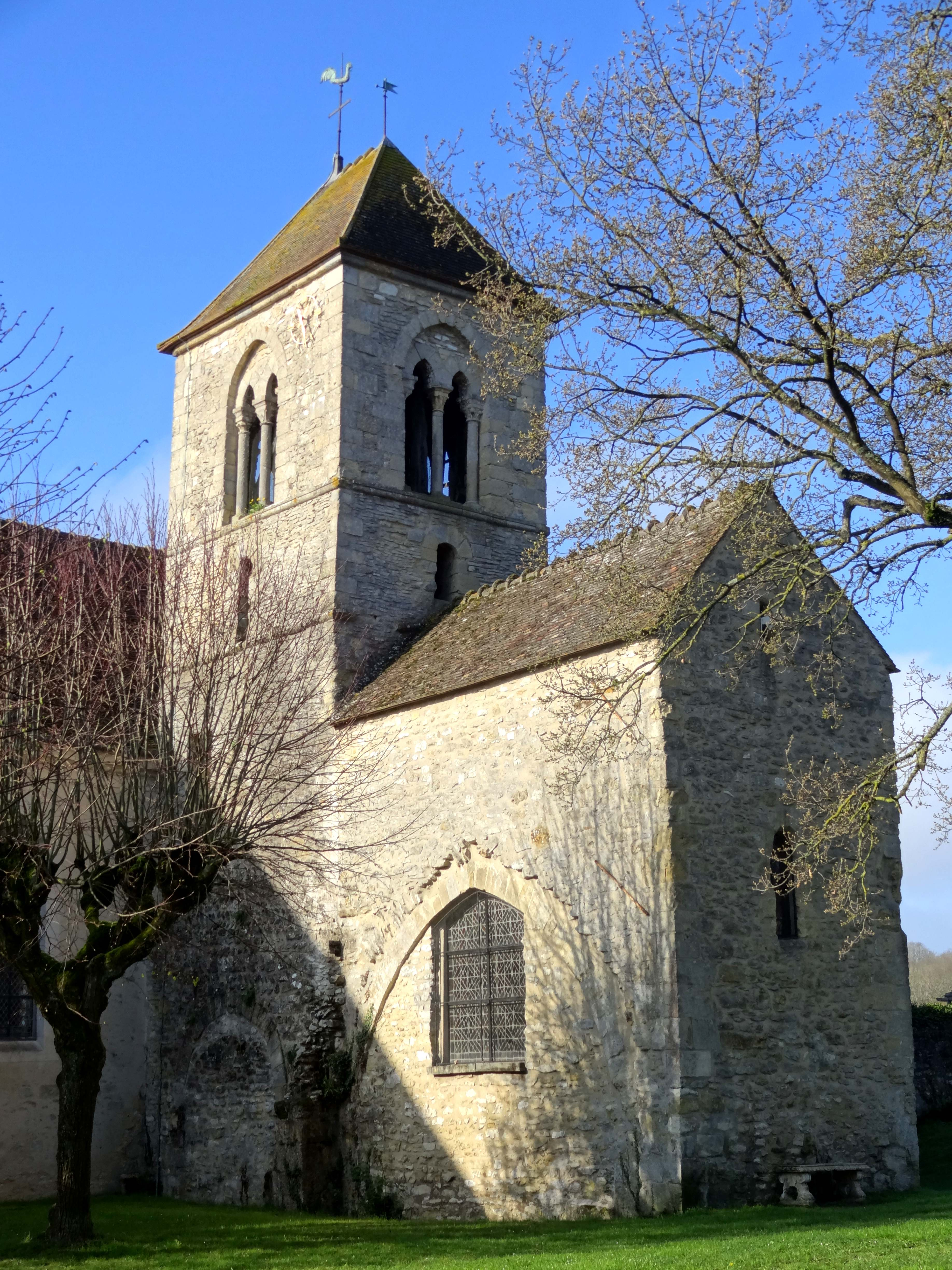 Église Saint-Martin de Follainville - voir titre.